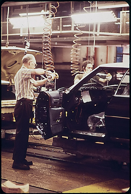 Fließbandmontage eines 1973er Cadillacs - INSTALLING BODY WIRING ON THE CADILLAC ASSEMBLY LINE, Item from Record Group 412: Records of the Environmental Protection Agency, 1944 - 2000 Uploaded with Reworkhelper Agency-Assigned Identifier: 121/34/007234; NAIL Control Number: NWDNS-412-DA-7234; Local Identifier: NWDNS-412-DA-7234 Bearbeitete Version von Image:INSTALLING_BODY_WIRING_ON_THE_CADILLAC_ASSEMBLY_LINE_-_06-1973_-_PD_-_LICON-NARA.gif durch Smial: farbbalance, kontrast, rauschen; Original-Beschreibung: (Uploaded by Benutzer:-jha-)